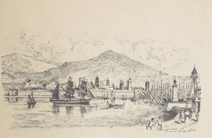 gravure d' Ernest Langlois et Ginos in Nos marins : vice-amiraux, contre-amiraux, officiers généraux des troupes de la marine et des corps entretenus d' Étienne Tréfeu 1888 (BNF/Gallica)